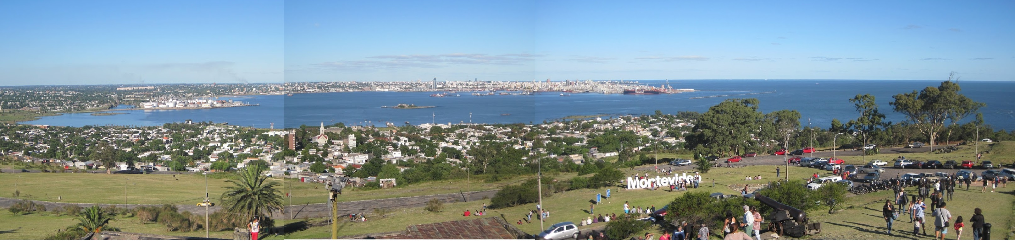 Panorámica Bahía Montevideo